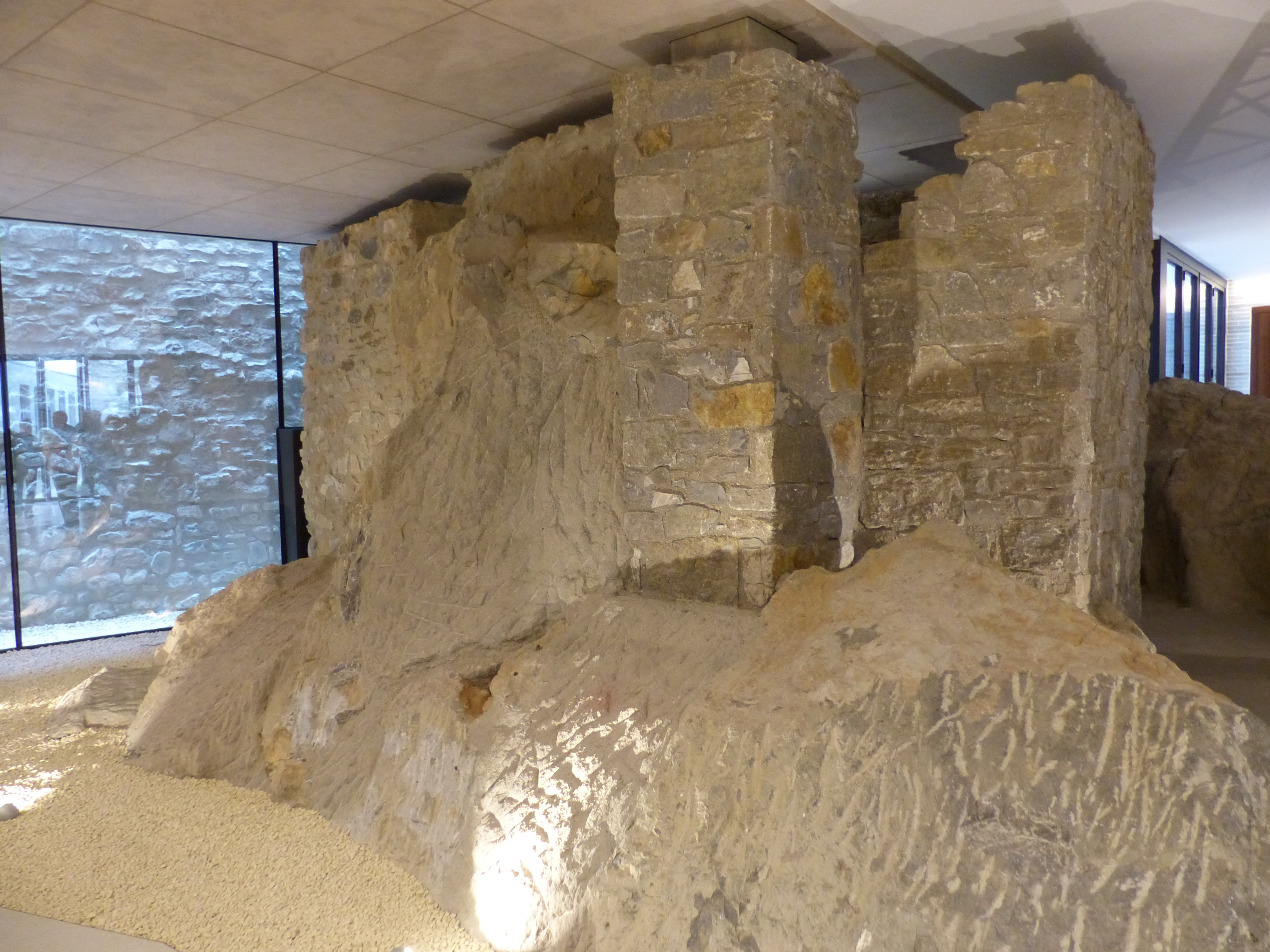 Freigelegter mittelalterlicher Wehrturm im Untergeschoss des Bischofssitzes Limburg (Konradinerkeller)